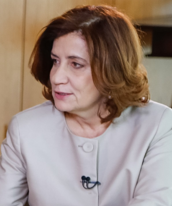 Míriam Leitão em outubro de 2016.